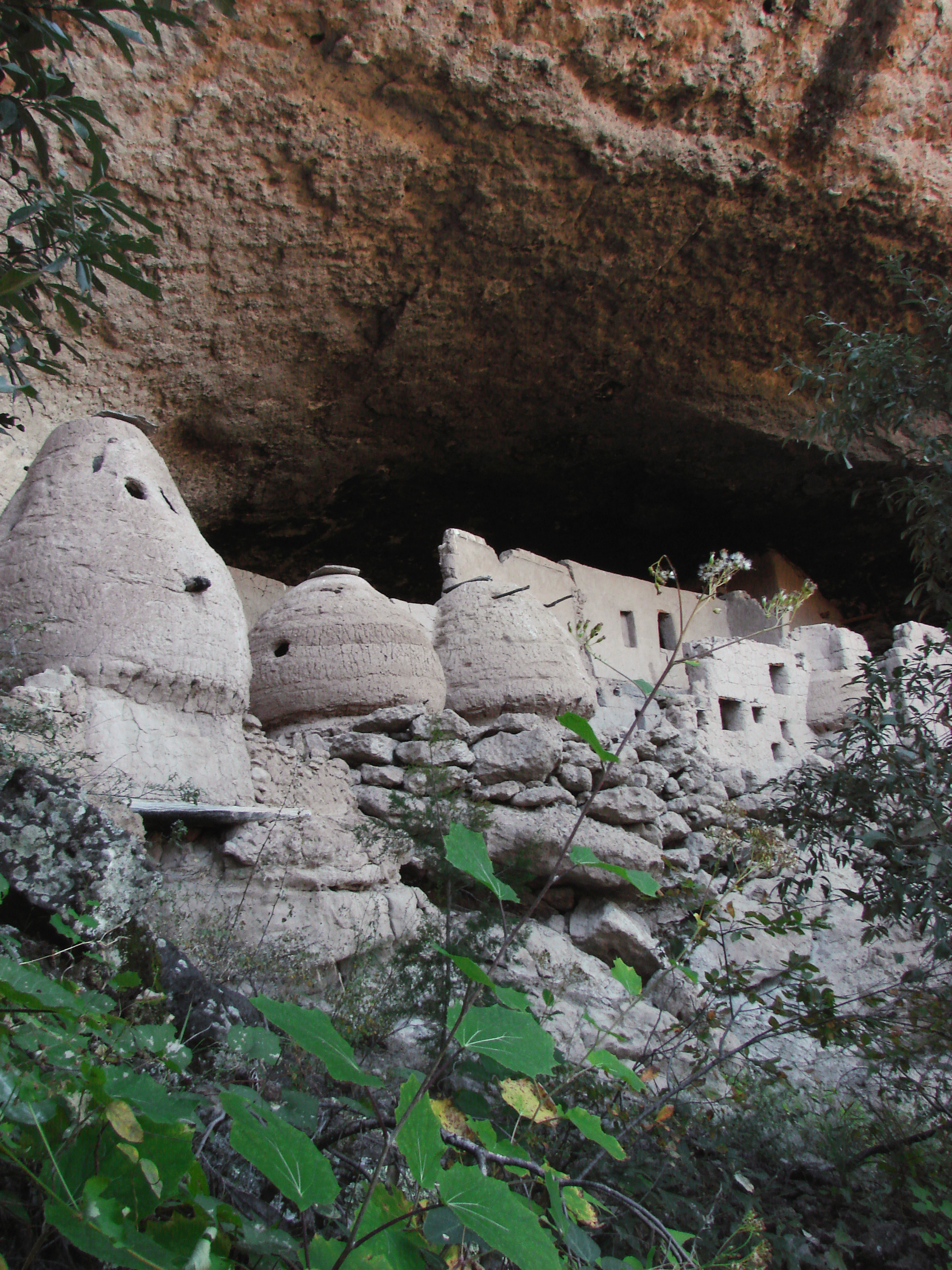 Las Jarillas Cave is one of the least known and hardest to get to archaeological cliff dwellings sites of the Paquime Culture at Cuarenta Casas, scrambled along the canyons of the Sierra Madre Occidental in Northwestern Chihuahua, Mexico. La Cueva de las Jarillas es uno de los sitios arqueológicos menos conocidos y mas difíciles de acceder, de la cultura Paquime, esparcidos entre las barrancas de la Sierra Madre en el noroeste de Chihuahua, México.